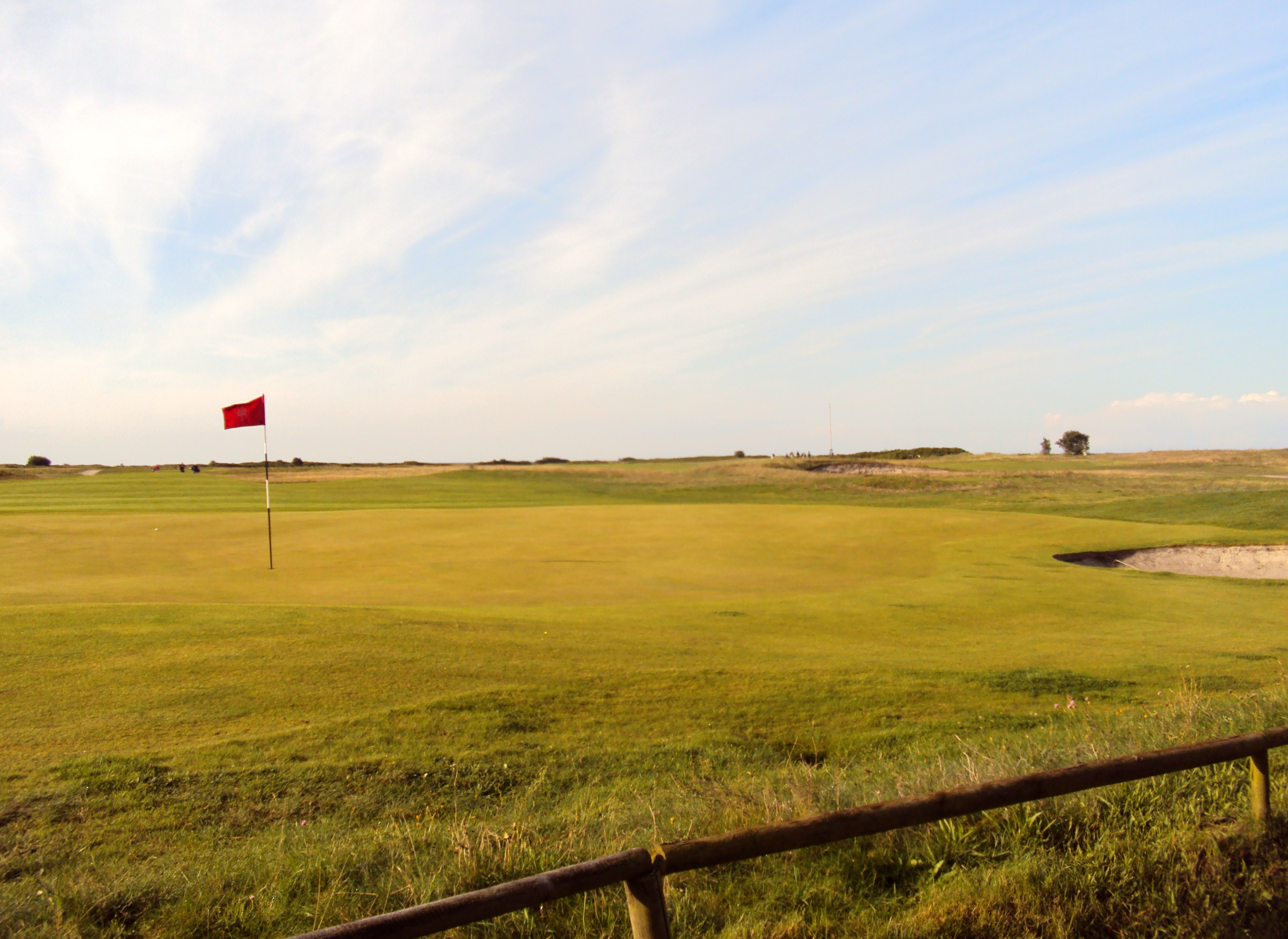 Falsterbo GK